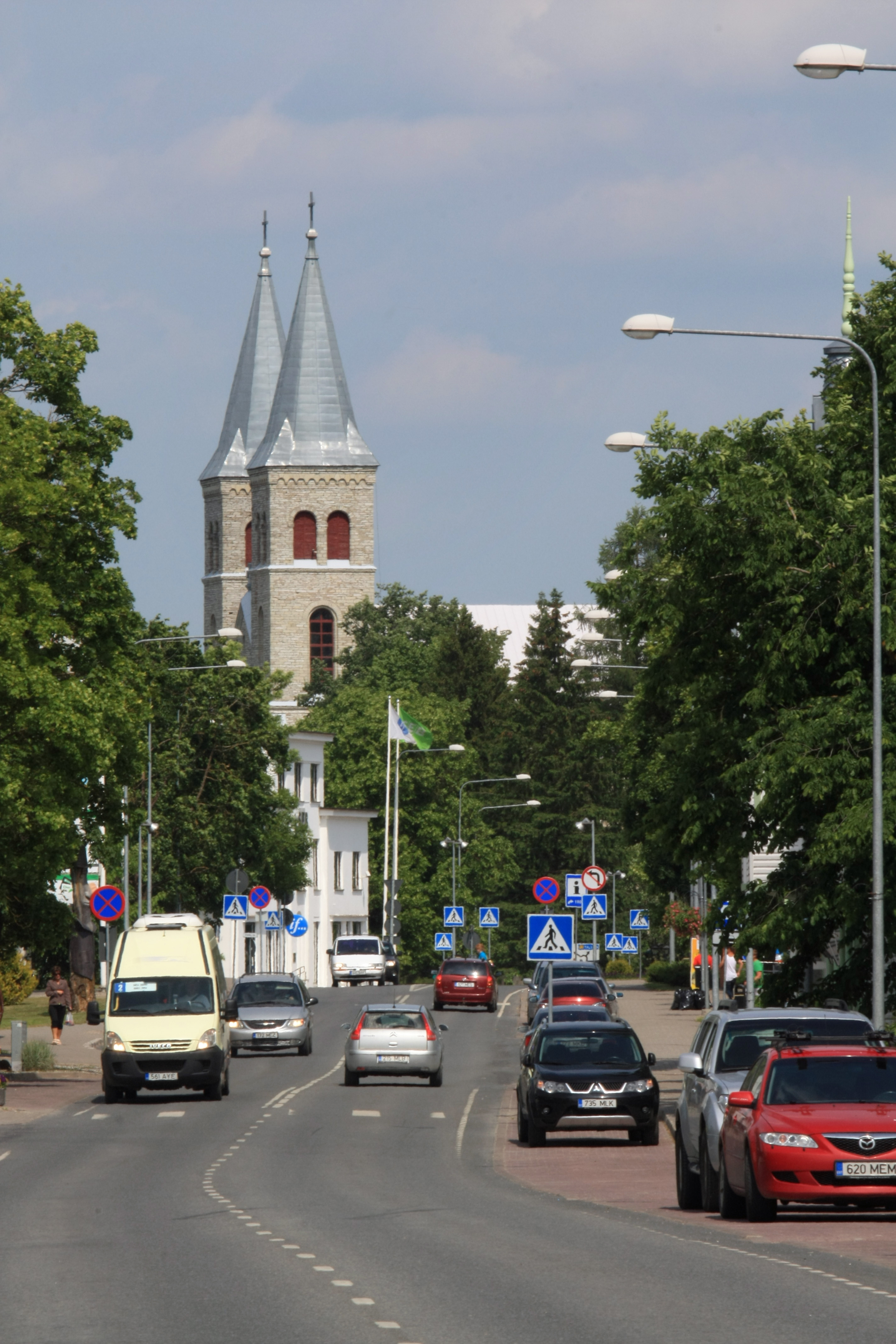 Rapla peatänav